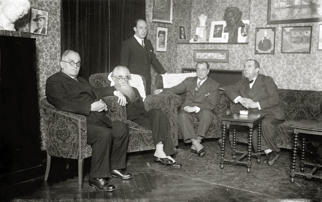 Título original: Diferentes personalidades en un salón del Ateneo Guipuzcoano, entre ellos se ecuentran Ramón María del Valle Inclán, el abogado Usandizaga, y Luis Ayestarán (director del Hospital San Antonio Abad y fundador del Instituto Oncológico) (1/1) Localización: San Sebastián (Guipúzcoa)